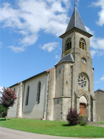 Eglise Ste Menne à MADECOURT